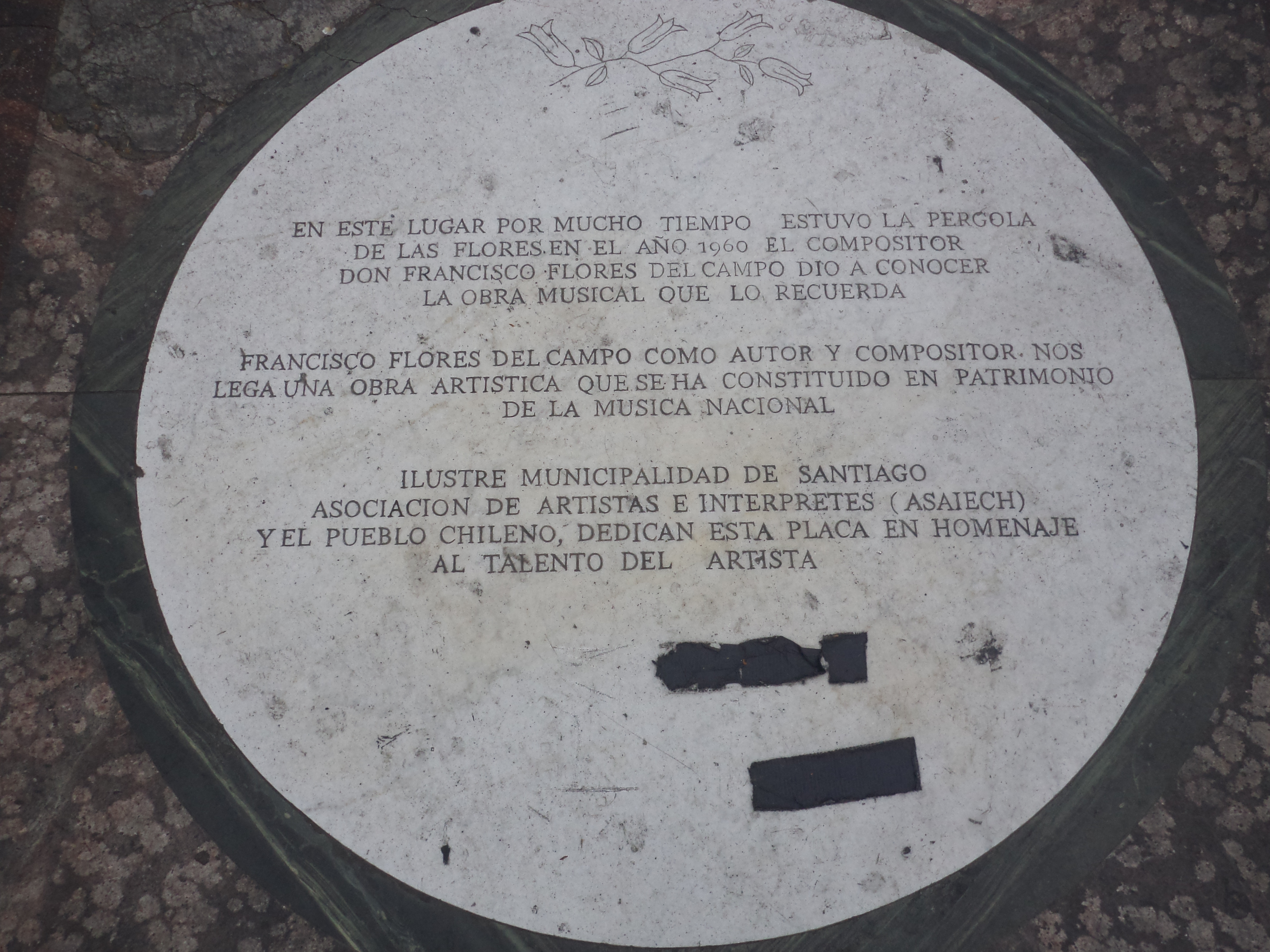 Placa puesta en el sitio histórico donde estaba ubicada Pérgola de las Flores en Alameda frente a Iglesia San Francisco en Santiago de Chile.